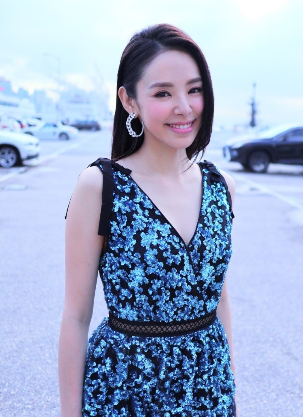 出席海港城港威商場大堂II《Anna Sui 築夢美人魚淡香水推廣會》